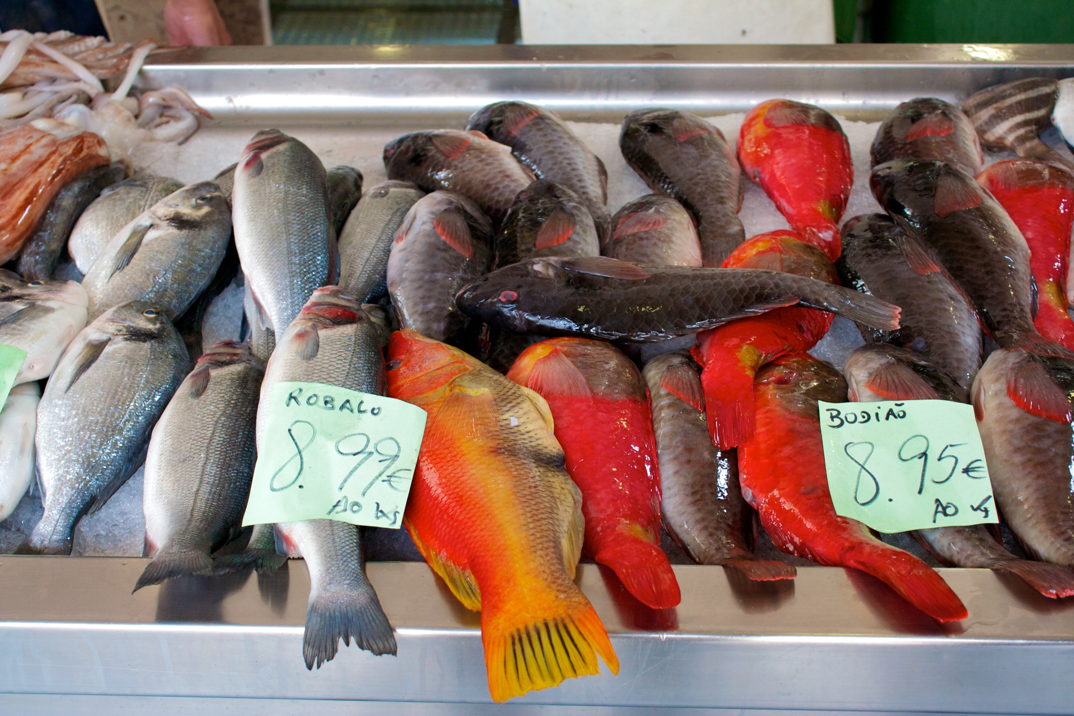 At Mercado dos Lavradores, Funchal